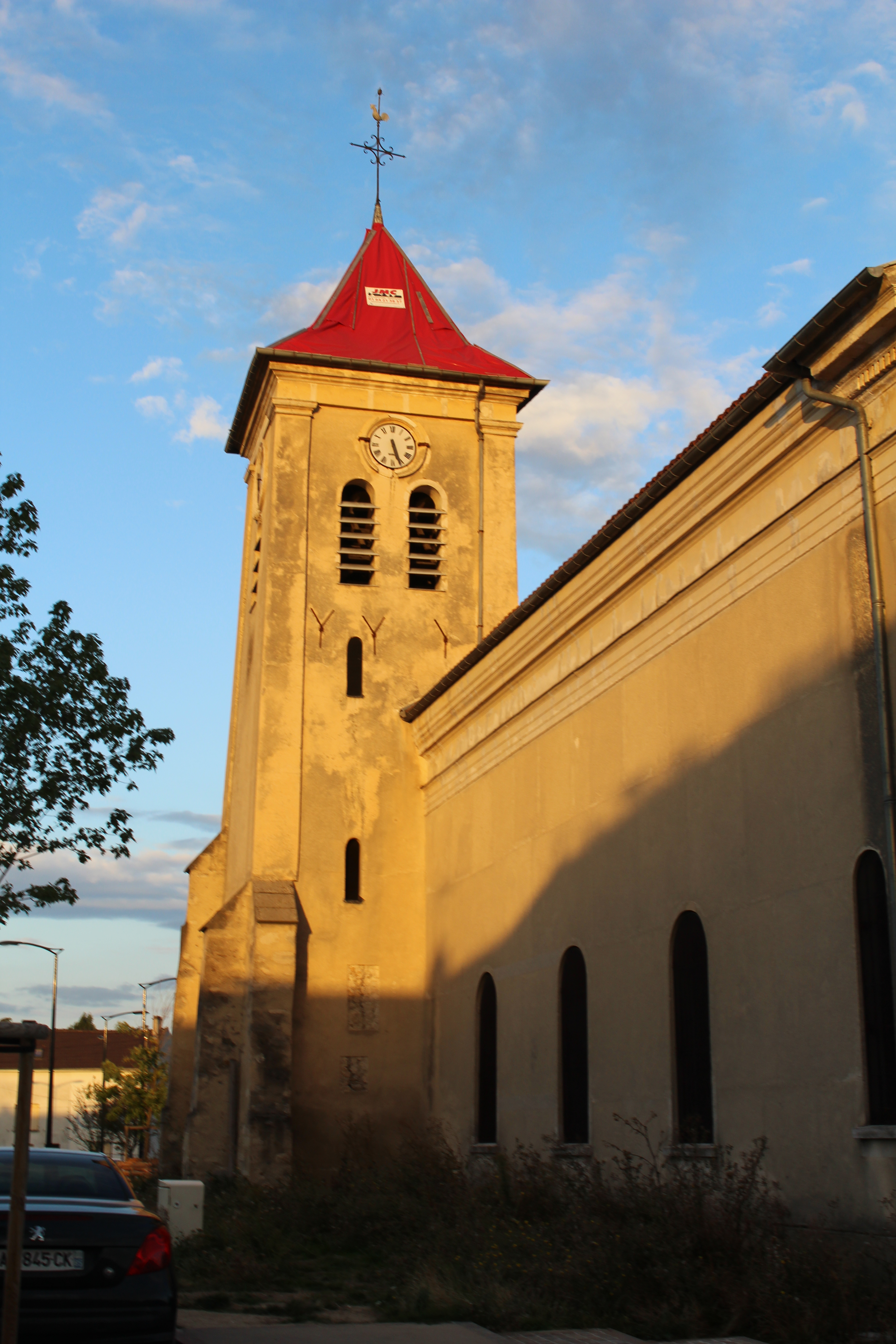 Église Saint-Pierre Saint-Paul de Montfermeil.